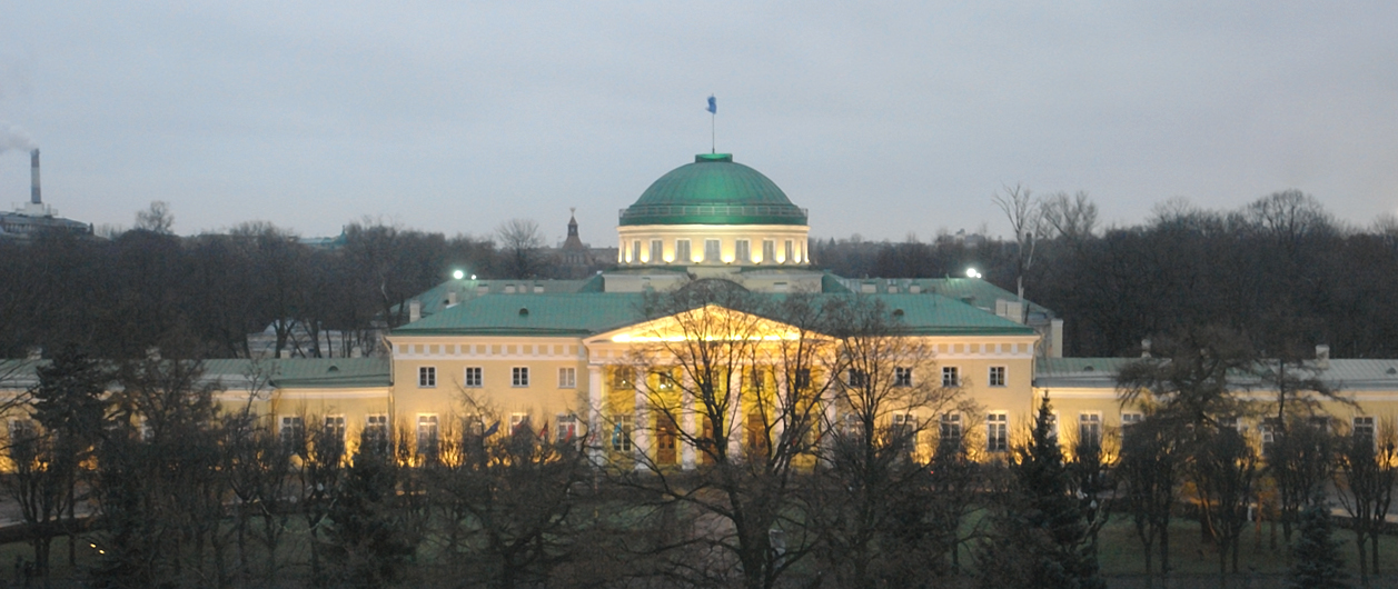 Таврический дворец (Вид с водонапорной башни - Музея Воды). Санкт-Петербург